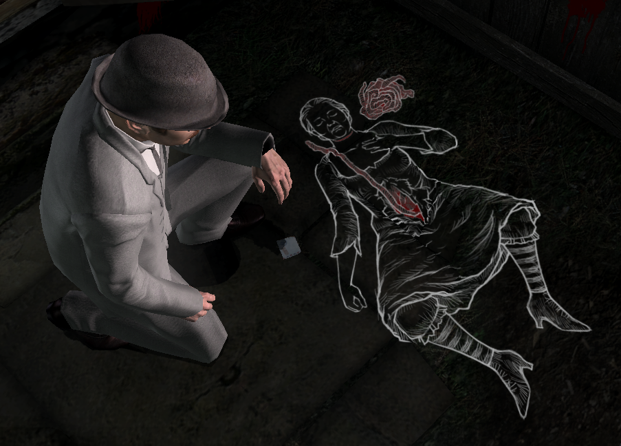 Capture d'écran du jeu Sherlock Holmes contre Jack l'Éventreur. Watson est ici à Hanbury Street, accroupi devant la silhouette d'Annie Chapman, seconde victime de "Jack l'Éventreur".